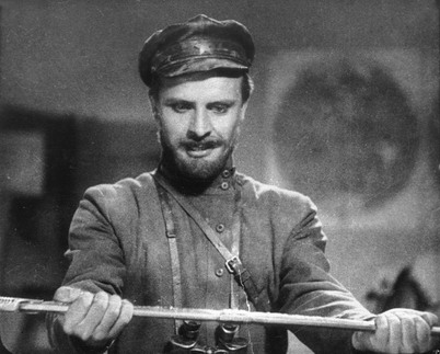 Кадр из фильма Щорс)